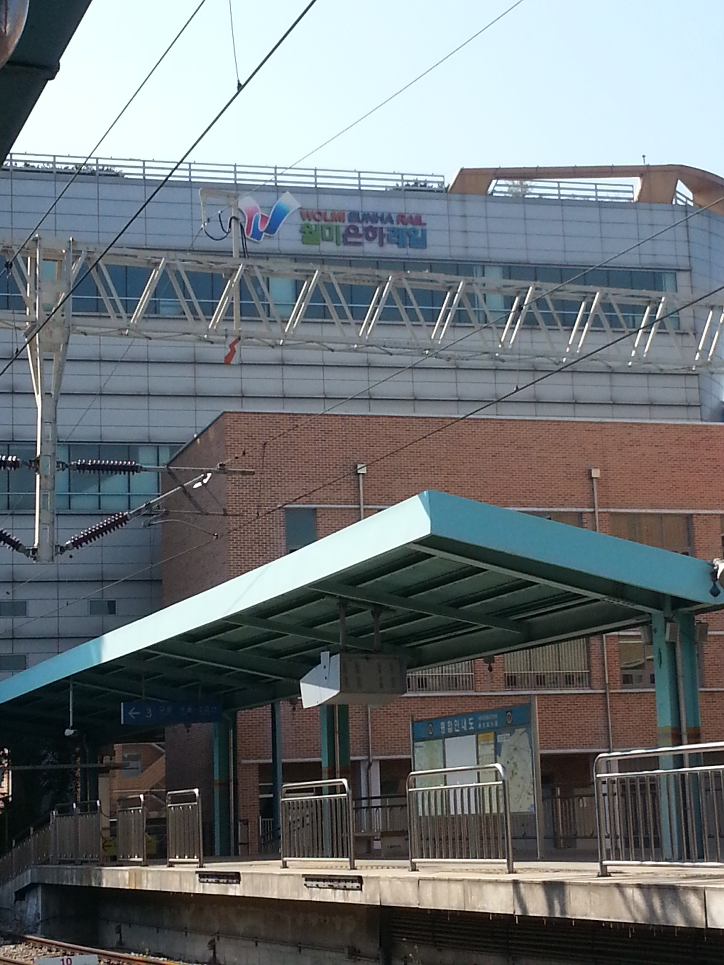 月尾銀河レール「仁川銀河駅」